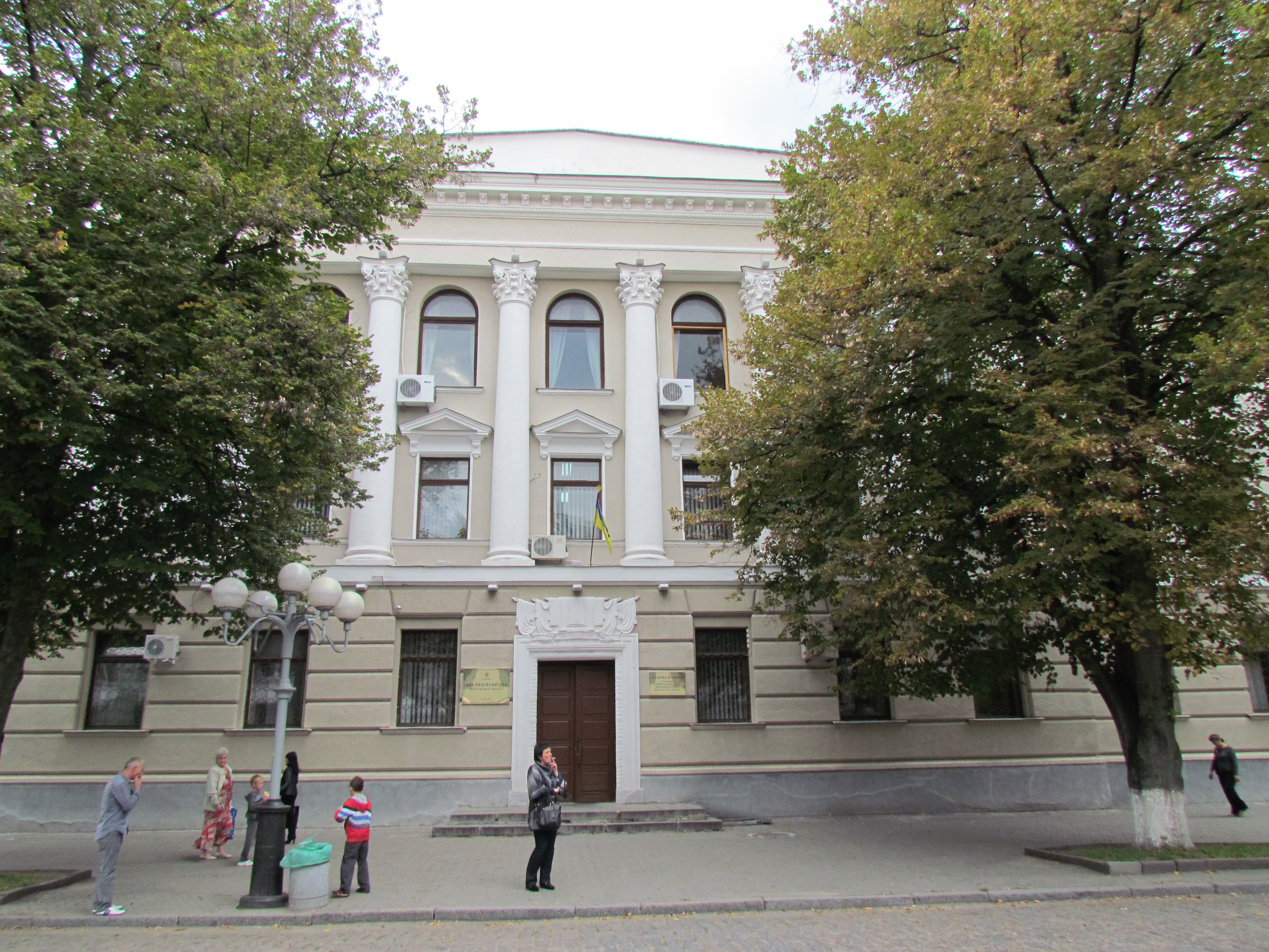 Будинок Полтавської міської ради (Облмайно)